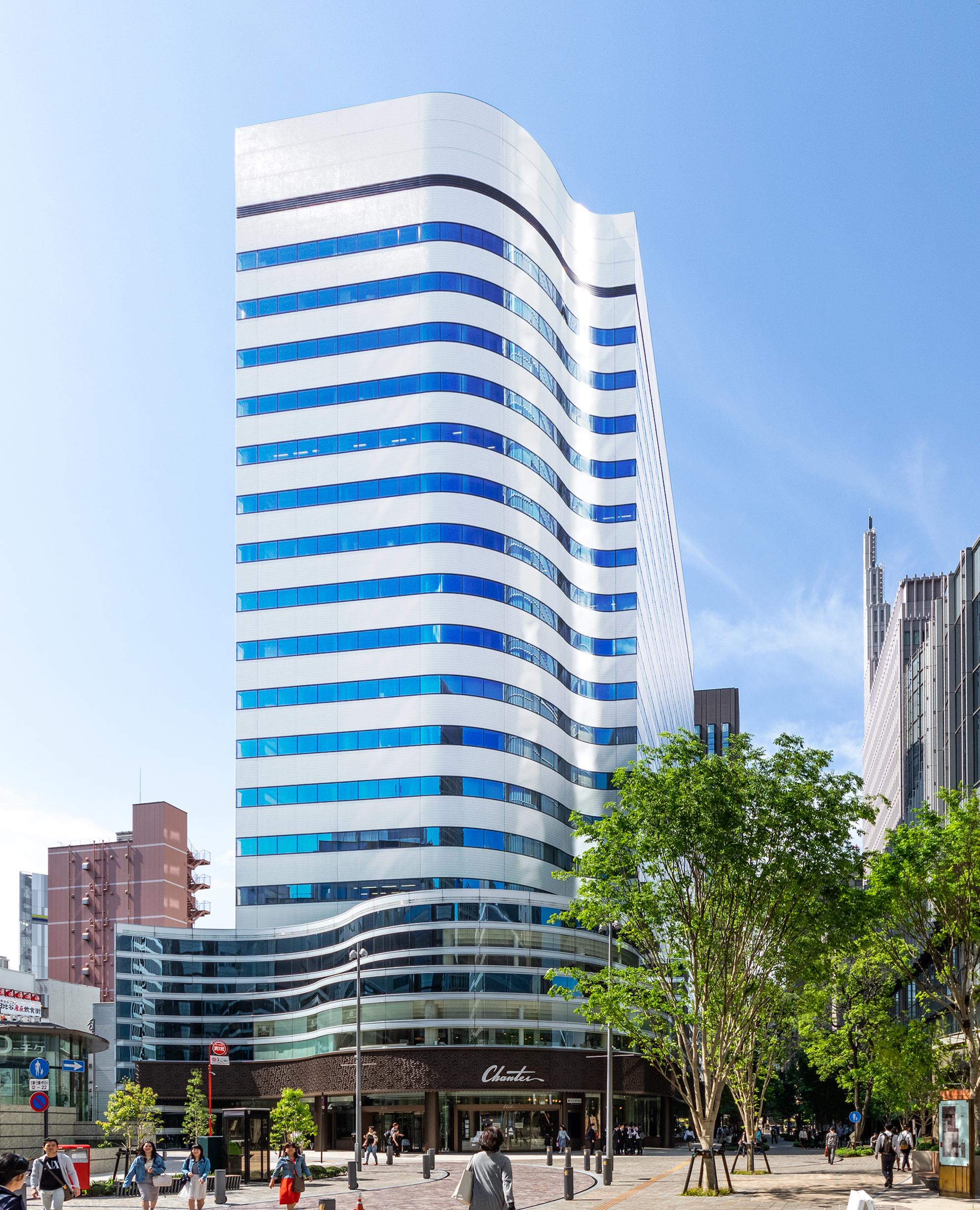 東宝日比谷ビル（2018年4月30日撮影）